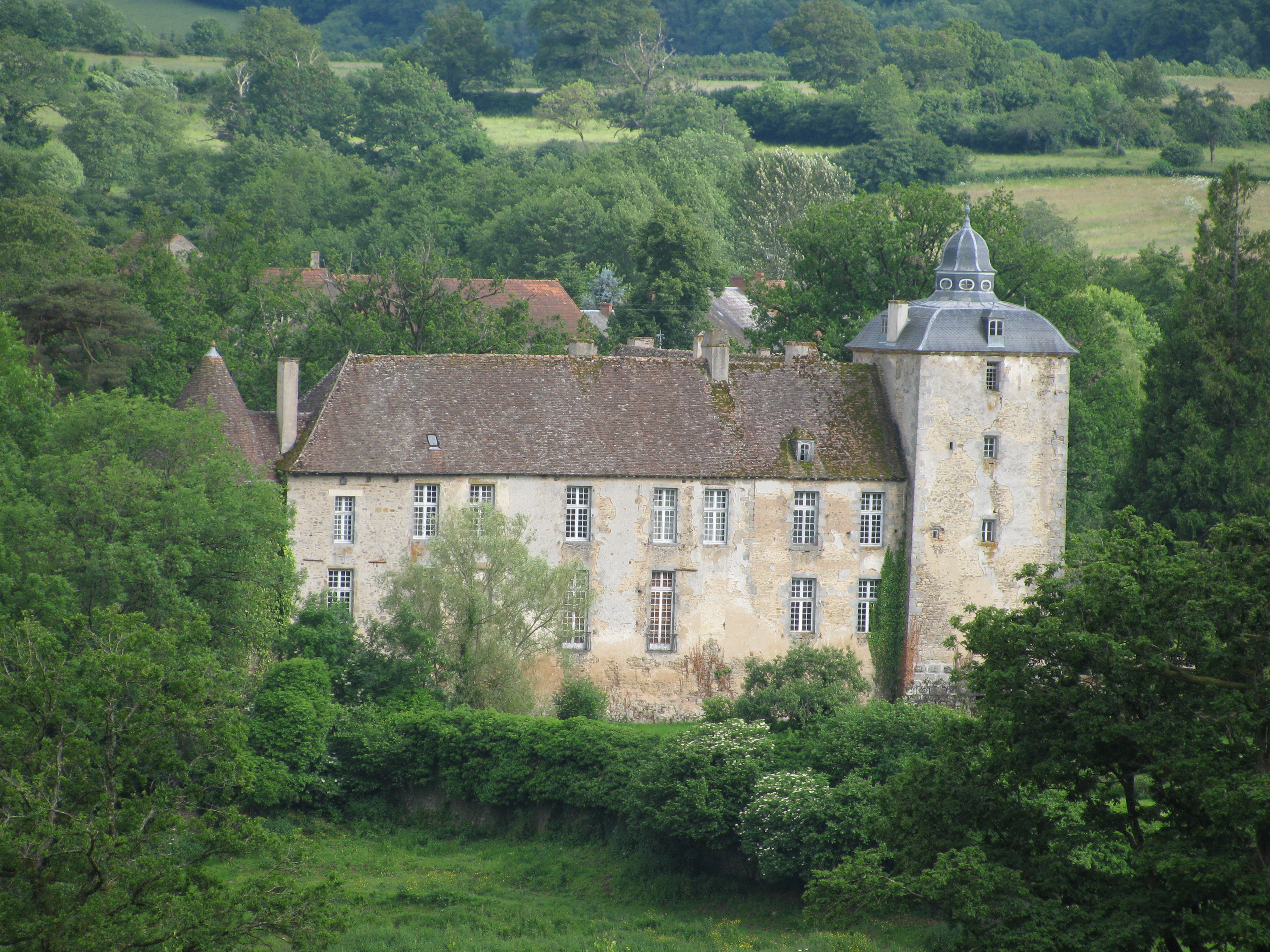 Château de Vésigneux, à Saint-Martin-du-Puy, Nièvre, France.